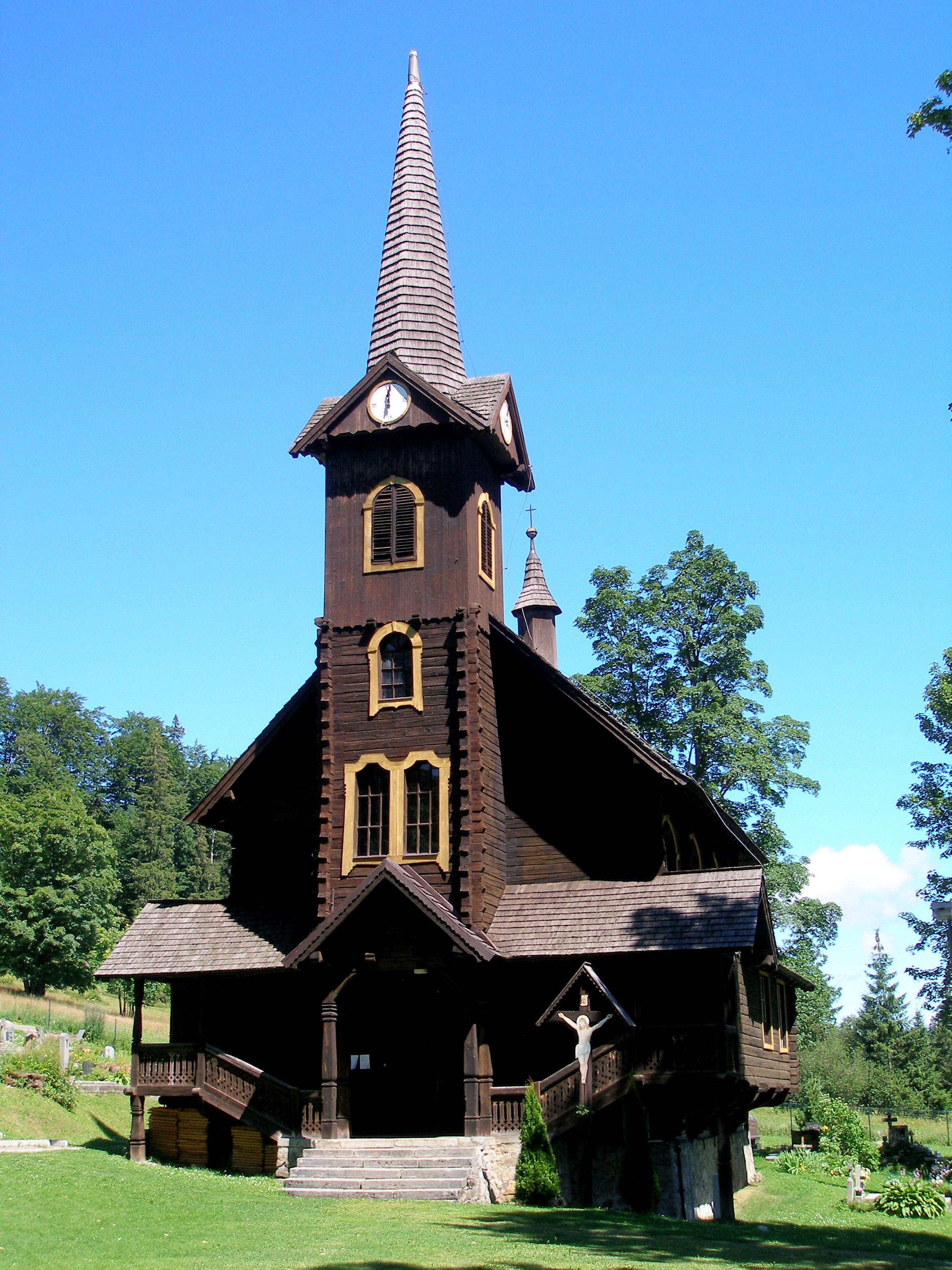 Podtatranská obec Tatranská Javorina.